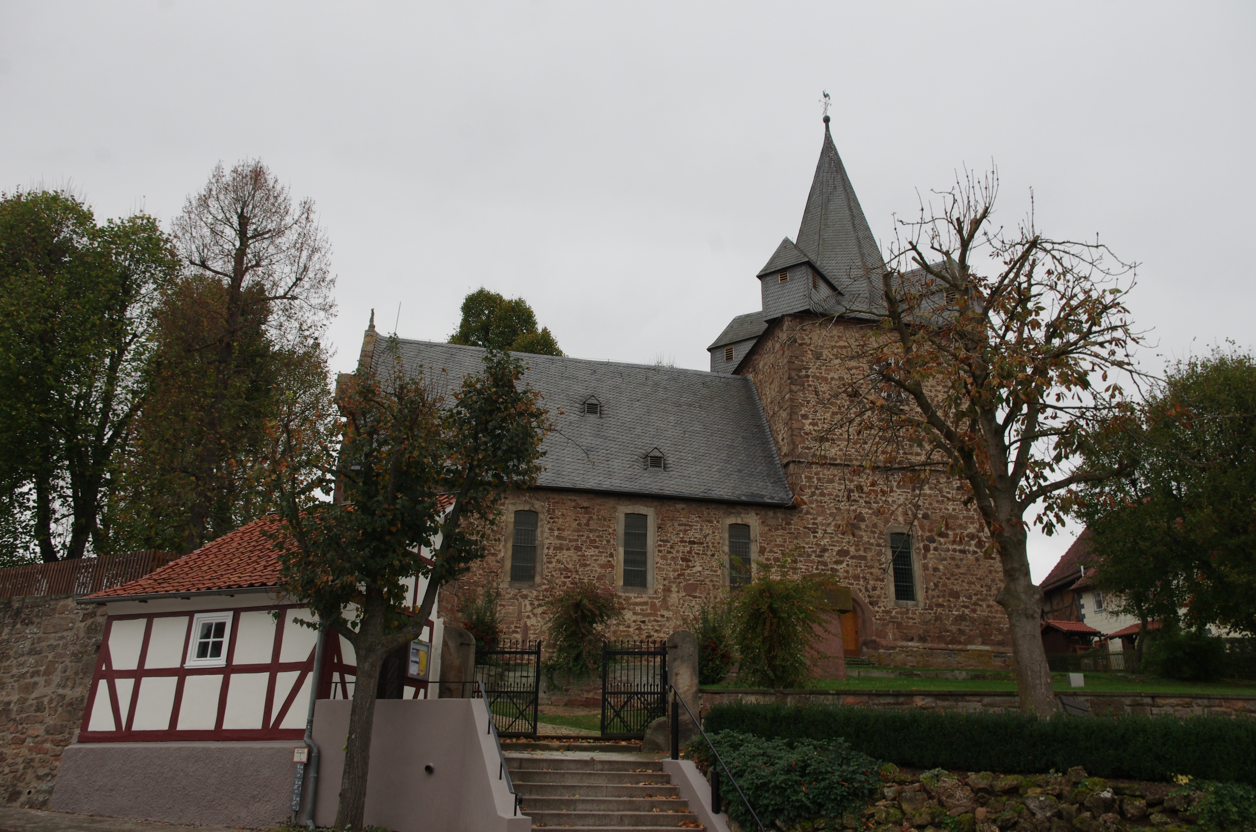 Edertal Ortsteil Bergheim in Hessen. Die Kirche im Ort befindet isch in der Ortsmitte an einem Hang.